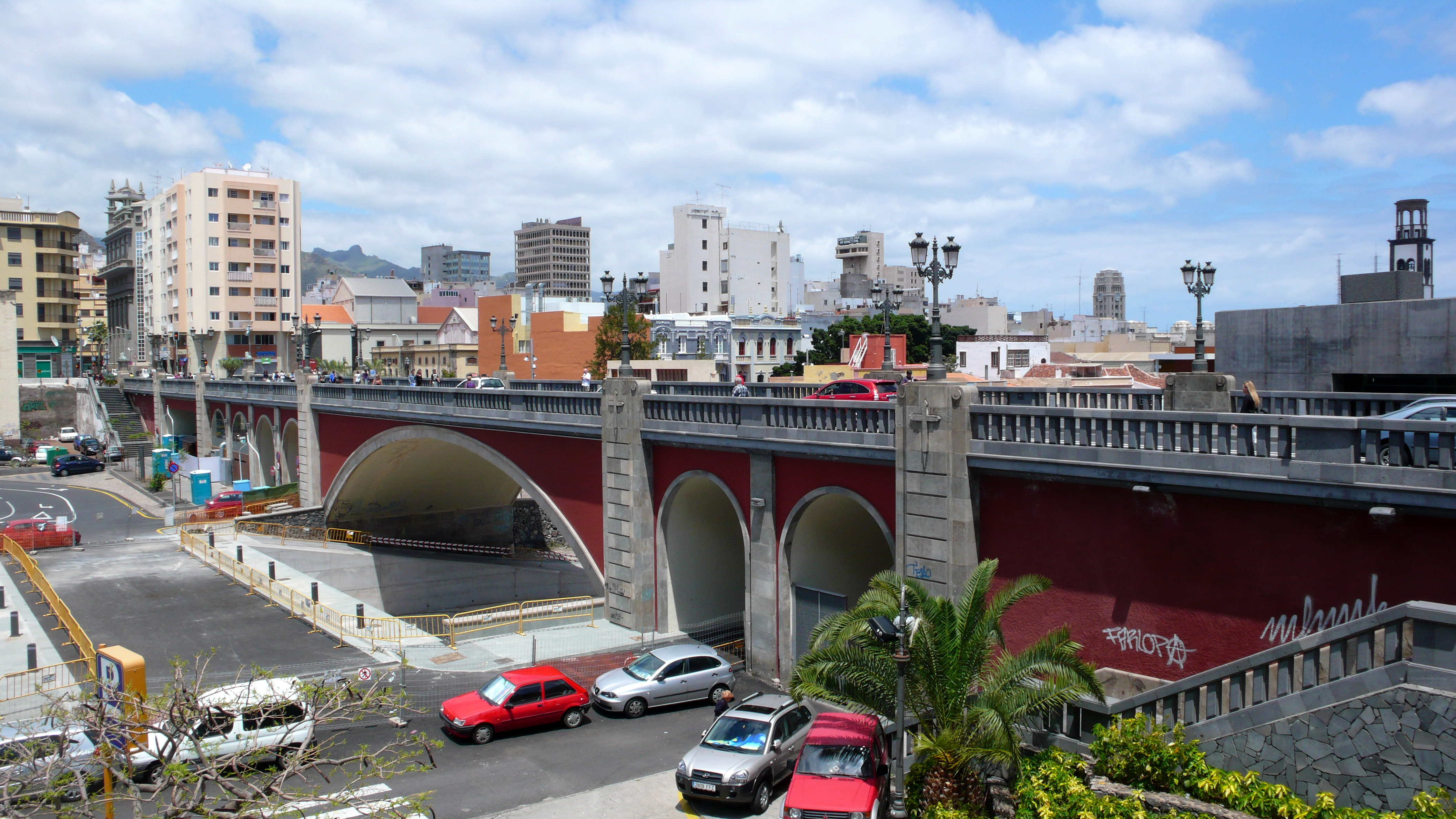 Puente General Serrador (2009)